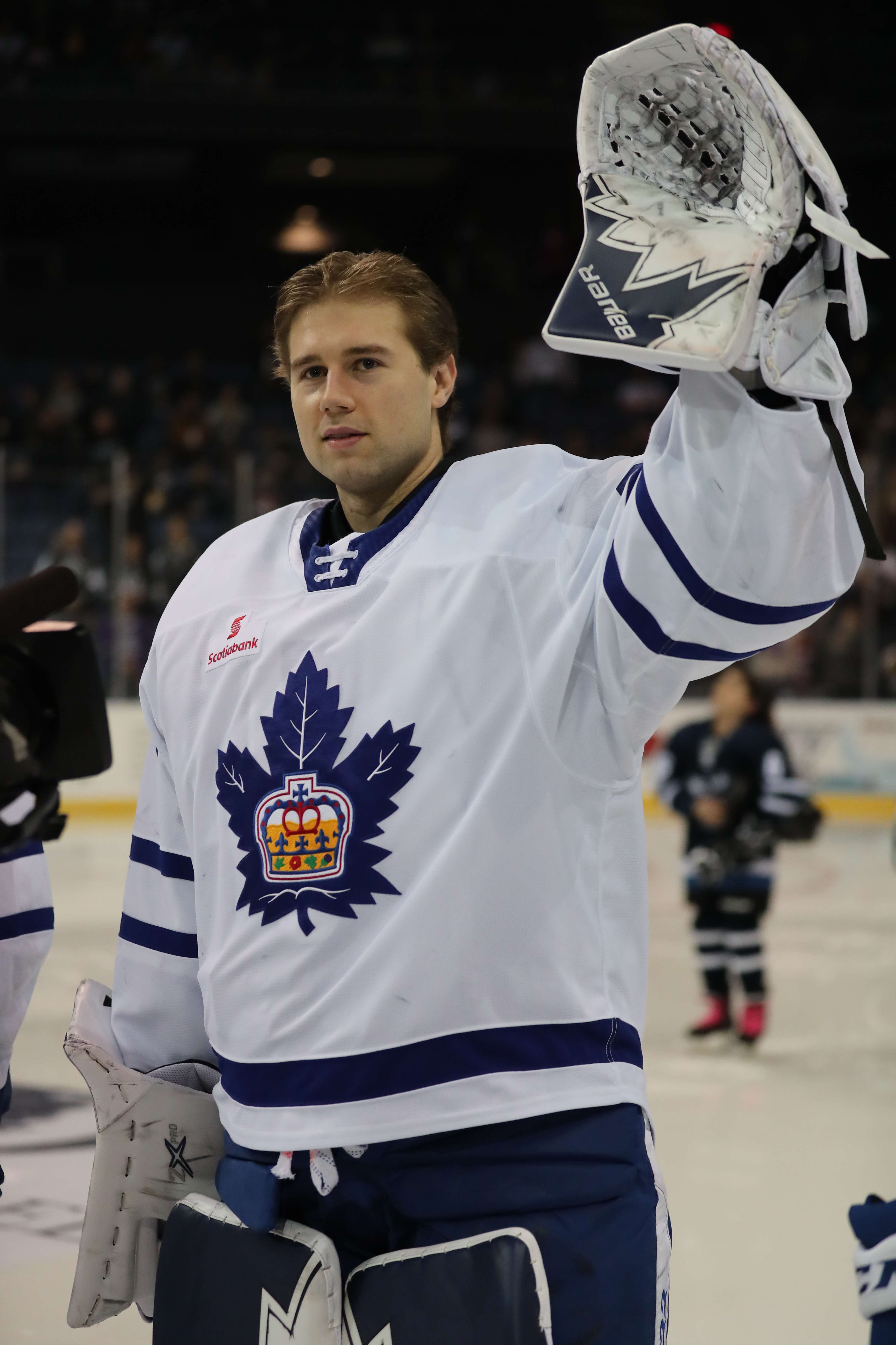 AA3I0796